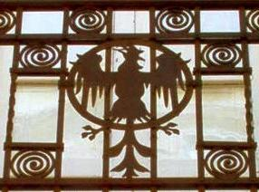 Palazzetto Coppedè di Gino Coppedè (Messina).